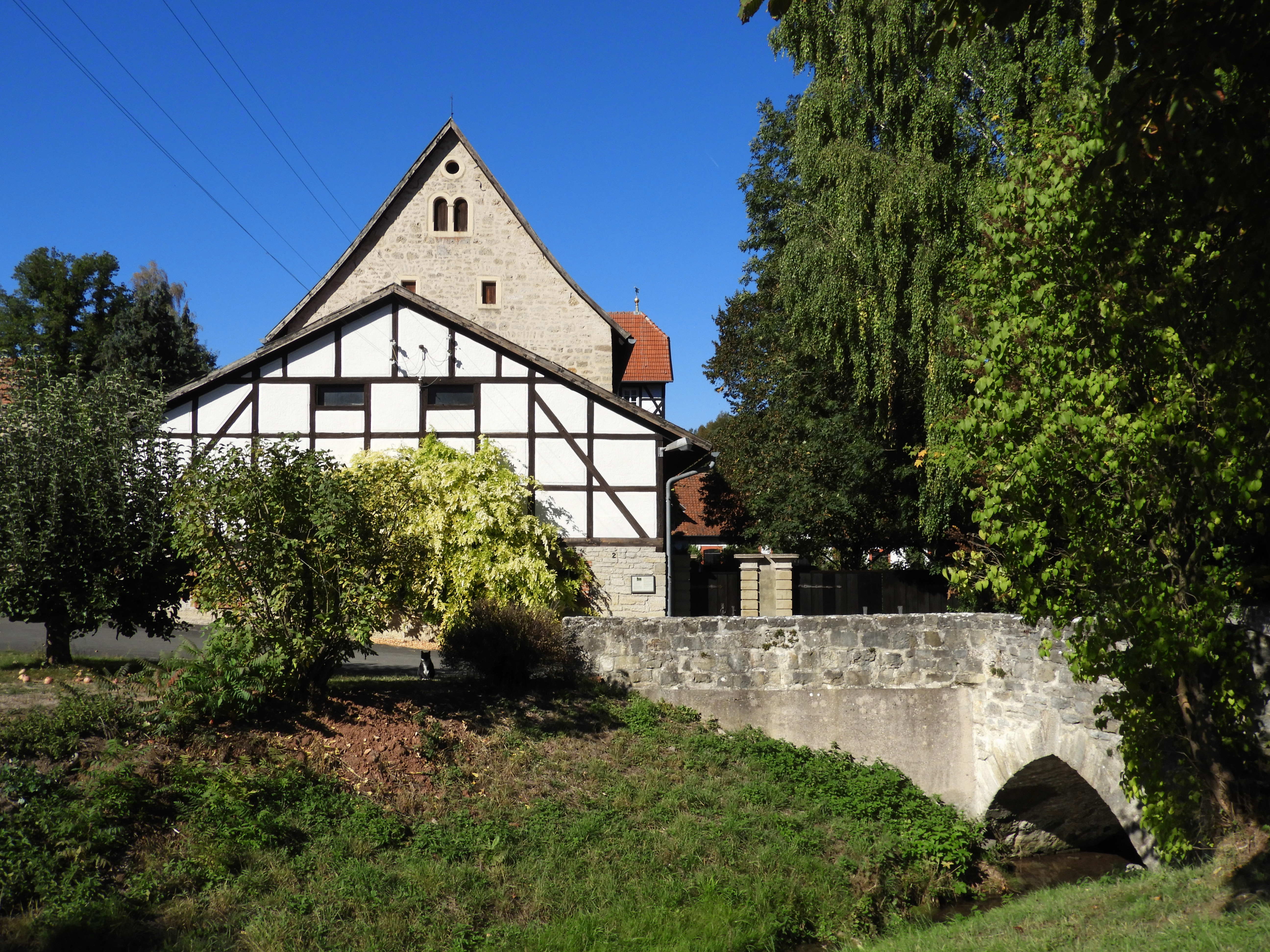 Der südliche Eingang mit der steinerne Brücken über den Lüderbach. Das ehemalige Schloss der Herren von Capellan steht am westlichen Ortsrand Lüderbachs. Das um 1560 erbaute Gutshaus erhebt sich in massivem Mauerwerk über einem längsrechteckigen Grundriss in zwei Geschossen mit einem in der Mittelachse eingefügten Querriegel, der das Treppenhaus beherbergt. Das seitlich angefügte Wirtschaftsgebäude stammt aus dem ersten Drittel des 20. Jahrhunderts. Mit in die Sachgesamtheit der Schlossanlage einbezogen wurde die steinerne Brücke über den Lüderbach, die den Zugang zum Hof gewährt. Das Schloss ist ein Kulturdenkmal aus künstlerischen, geschichtlichen und städtebaulichen Gründen. Lüderbach ist ein Ortsteil der Gemeinde Ringgau im nordhessischen Werra-Meißner-Kreis.